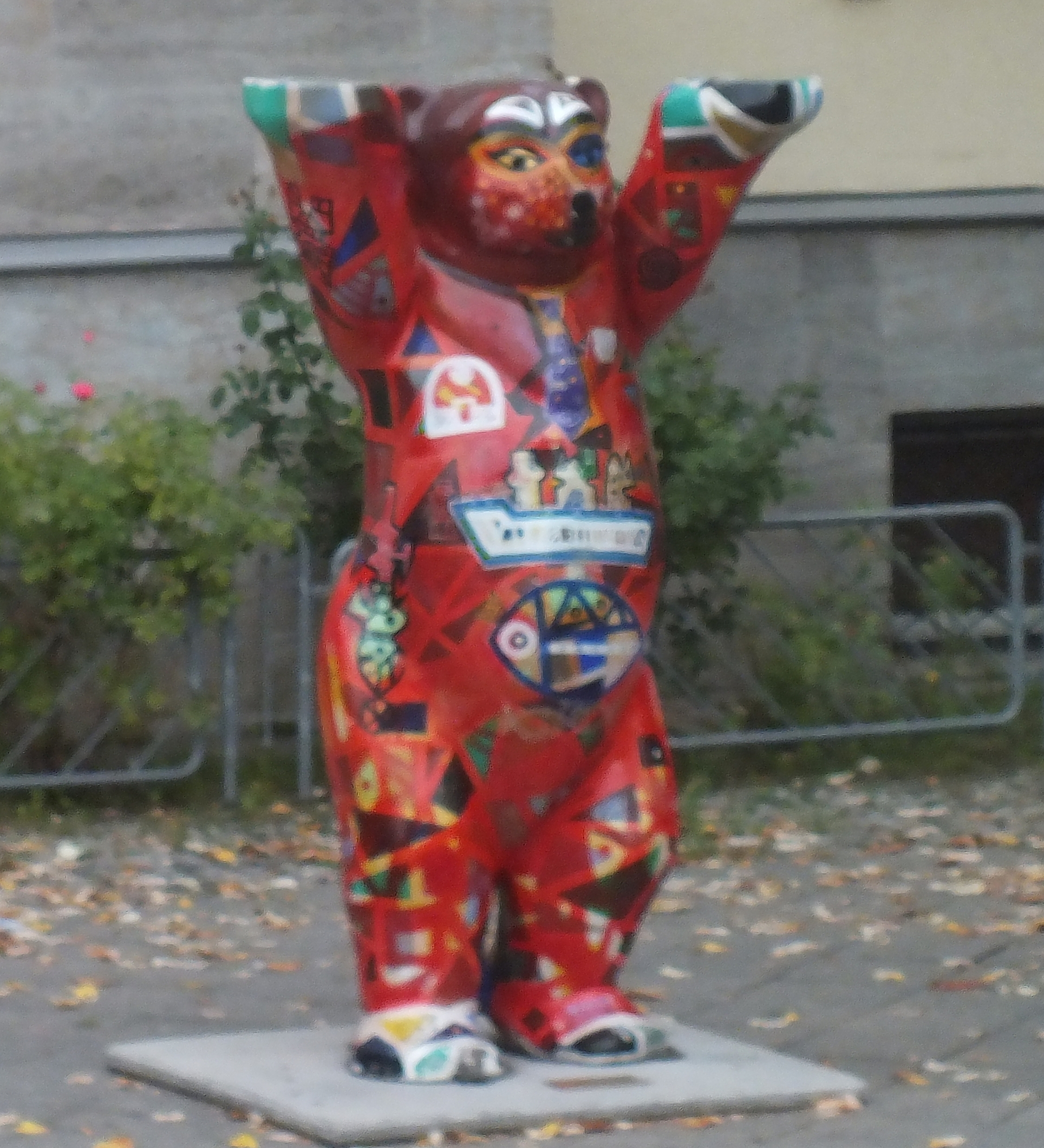 Berlin-Charlottenburg, Otto-Suhr-Allee, Kirgis. Botschaft